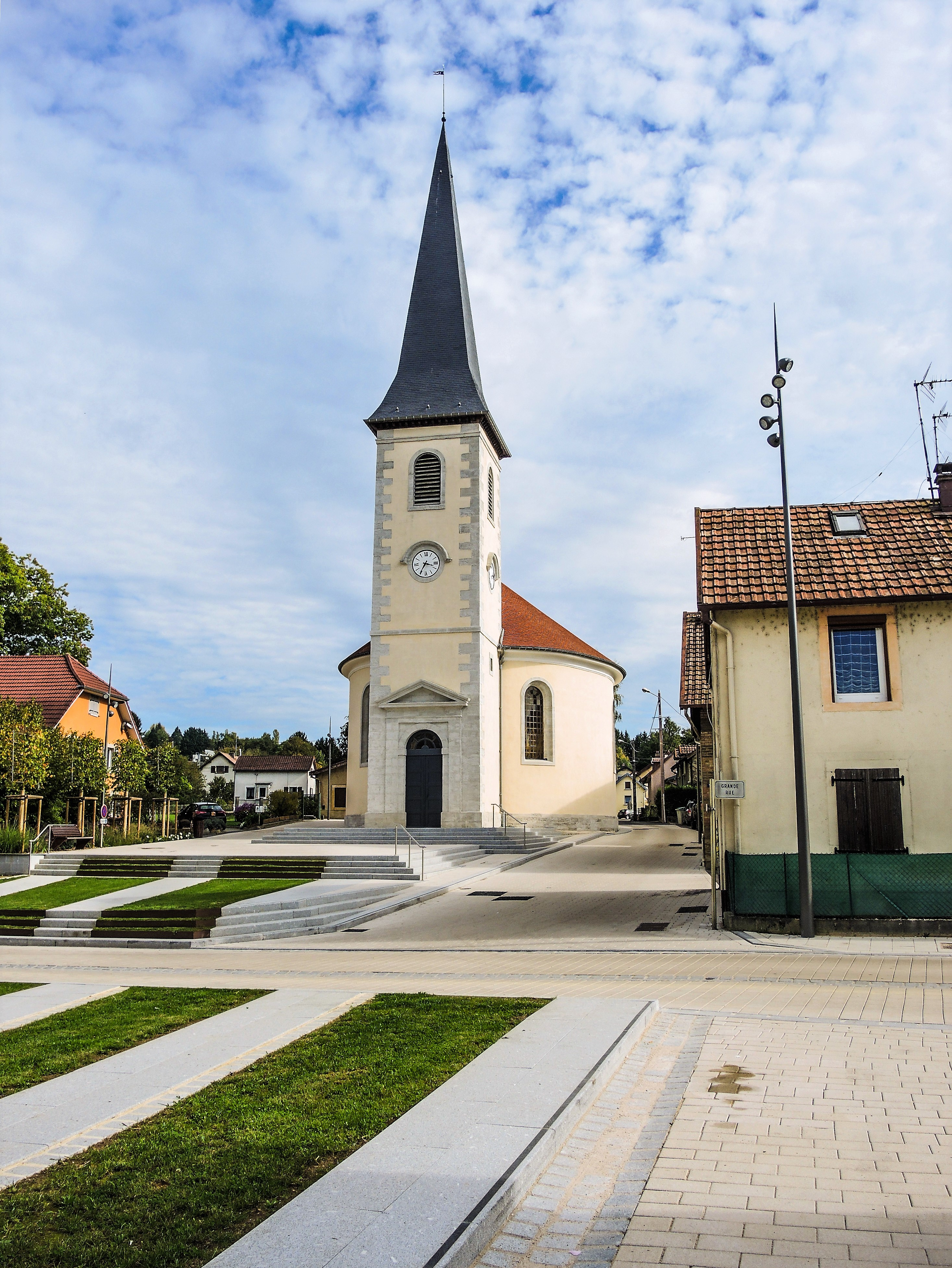 Le temple de Voujeaucourt, vu du parvis de l'église. Doubs